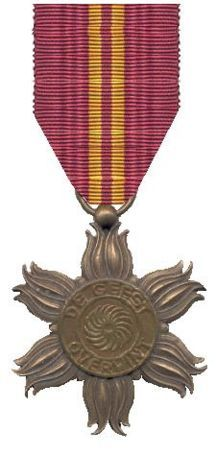 Verzetsster 1942-1945 ontworpen door Frans Smits